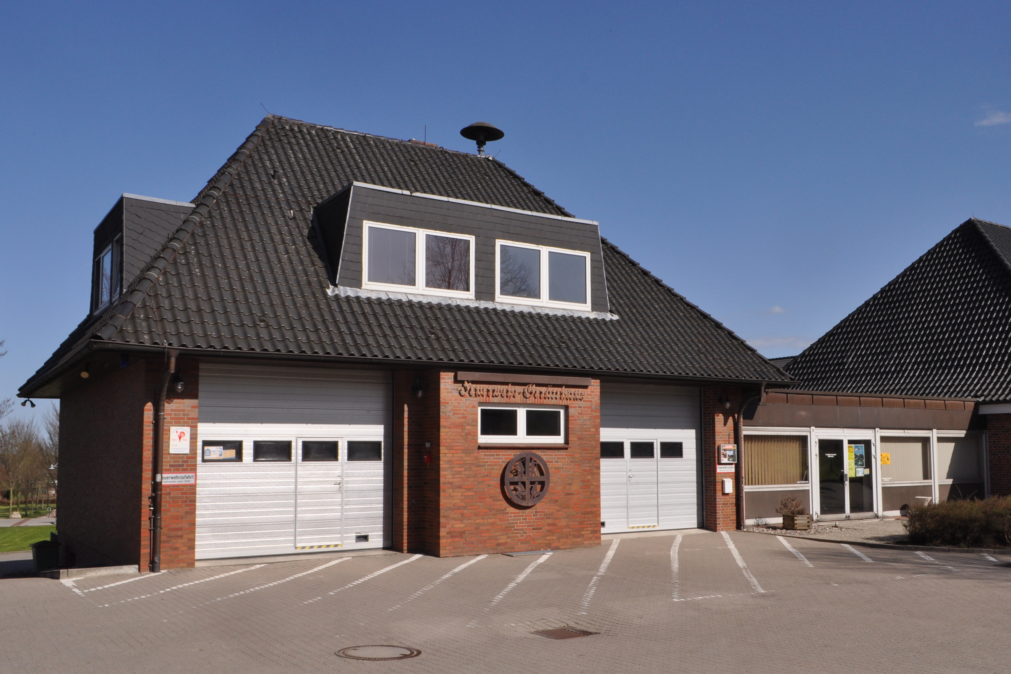 Freiwillige Feuerwehr der Gemeinde Elmenhorst im Kreis Stormarn.